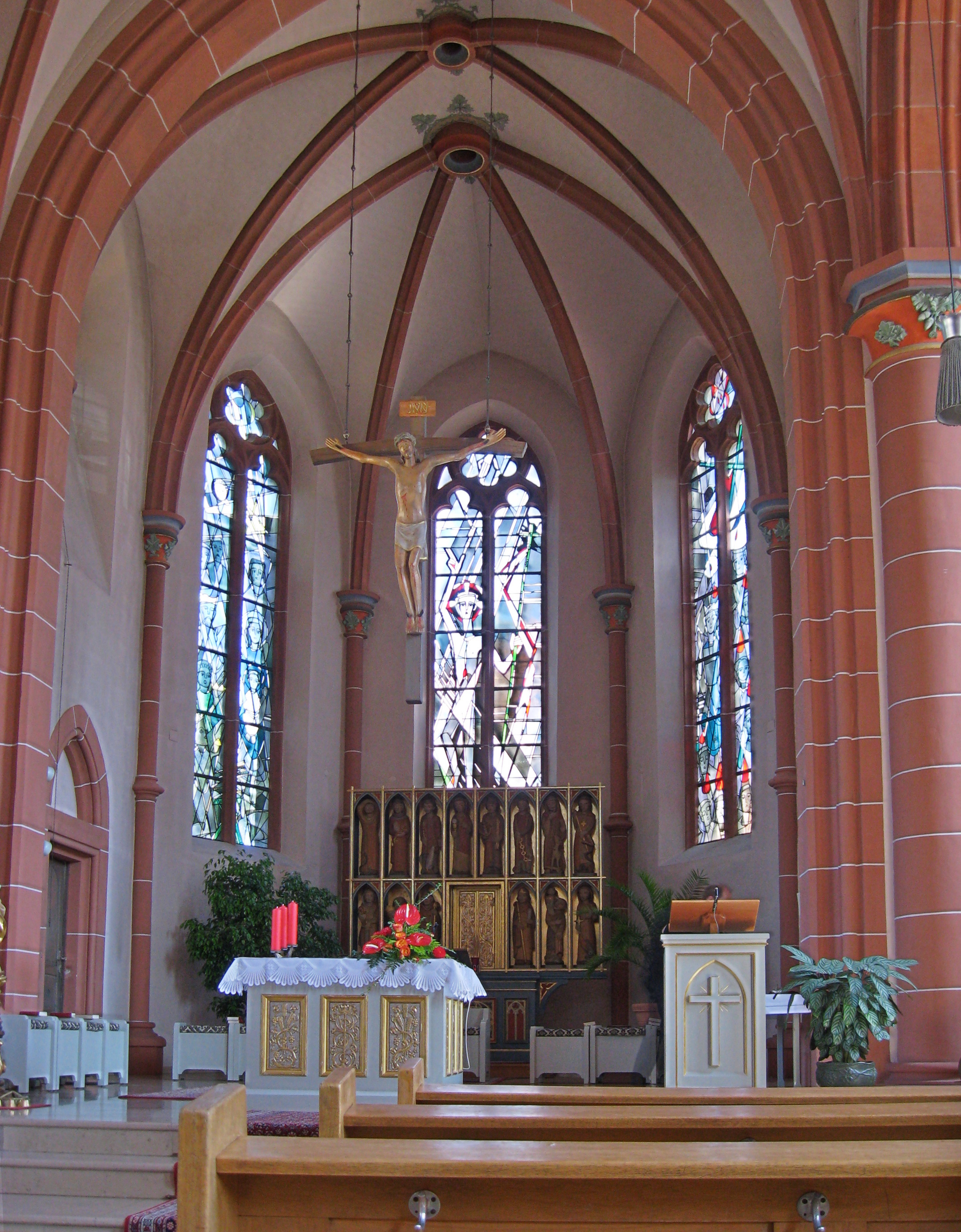 Kirche in Pachten